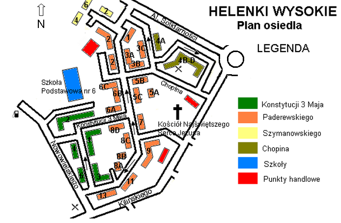 Śrem, Helenki - część bloków wielorodzinnych, plan osiedla